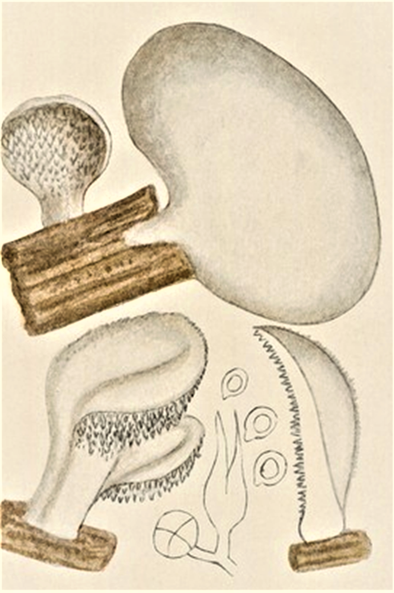 Giacomo Bresadola: Tremellodon gelatinosum f. alba